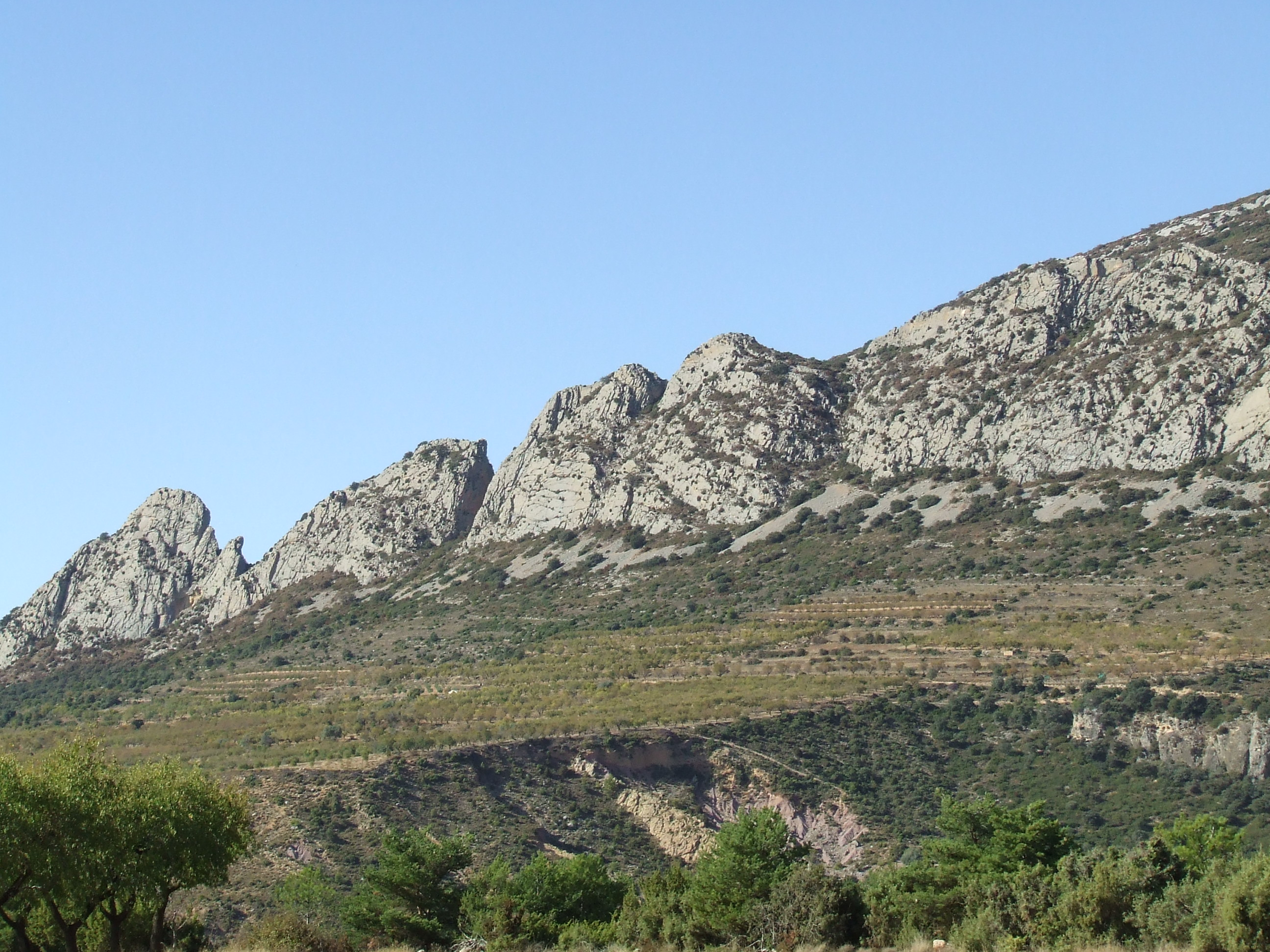 Les Vielles (Abella de la Conca, Pallars Jussà)